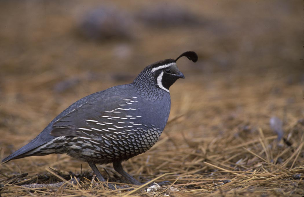 California Quail (Callipepla californica)